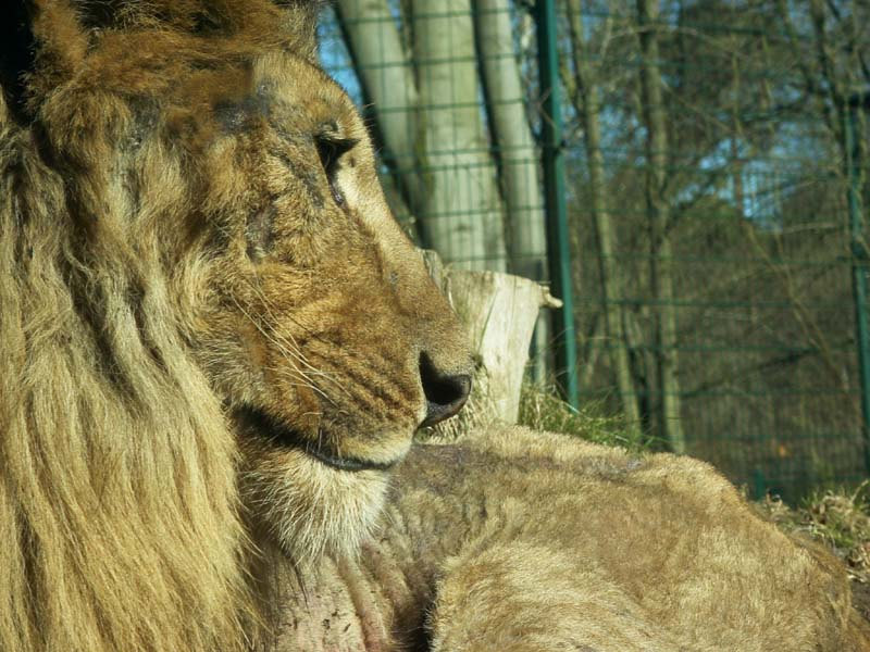 Szene im Tierpark Eberswalde